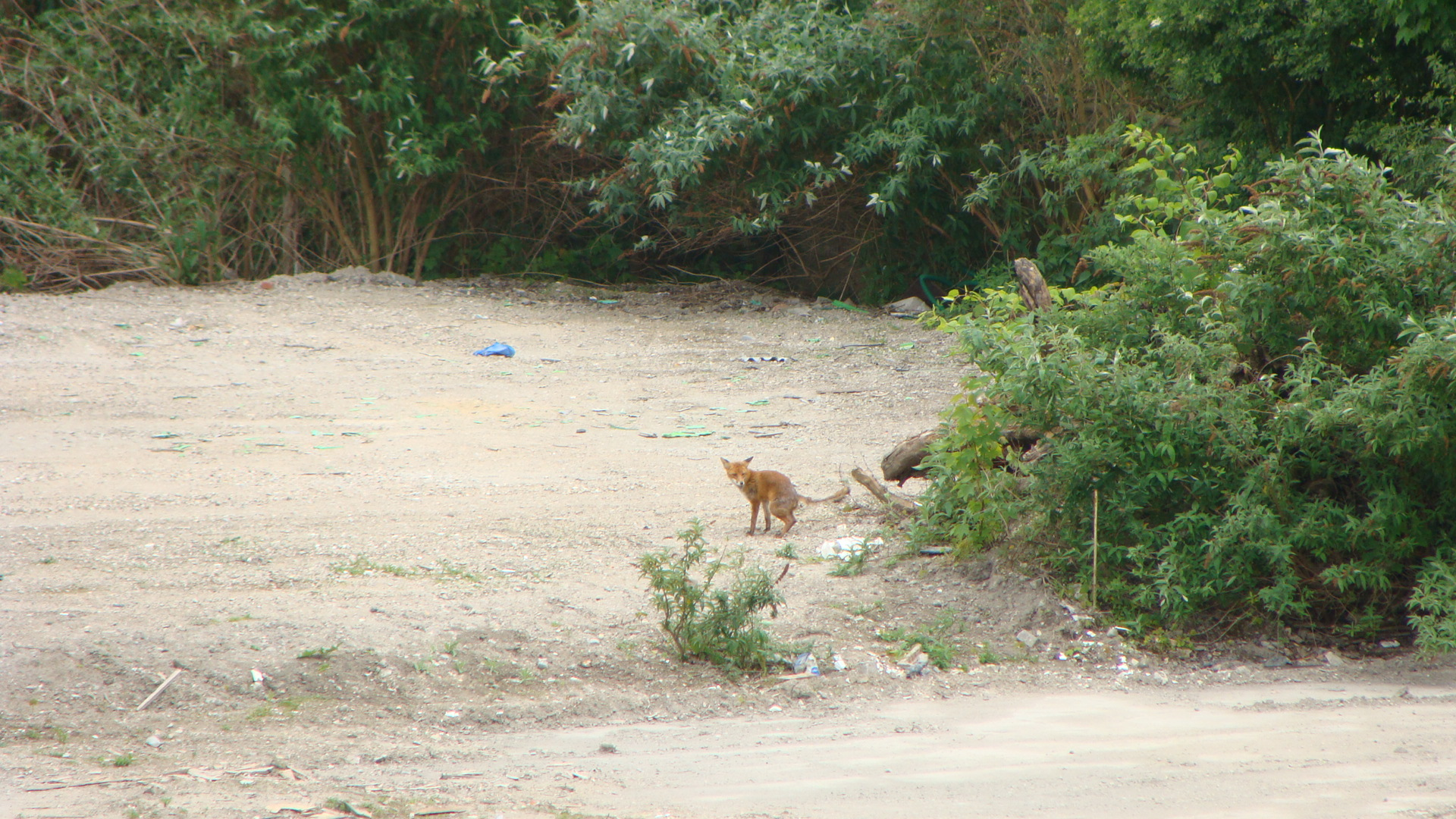 Renard roux en flagrant délit de pose photo 2